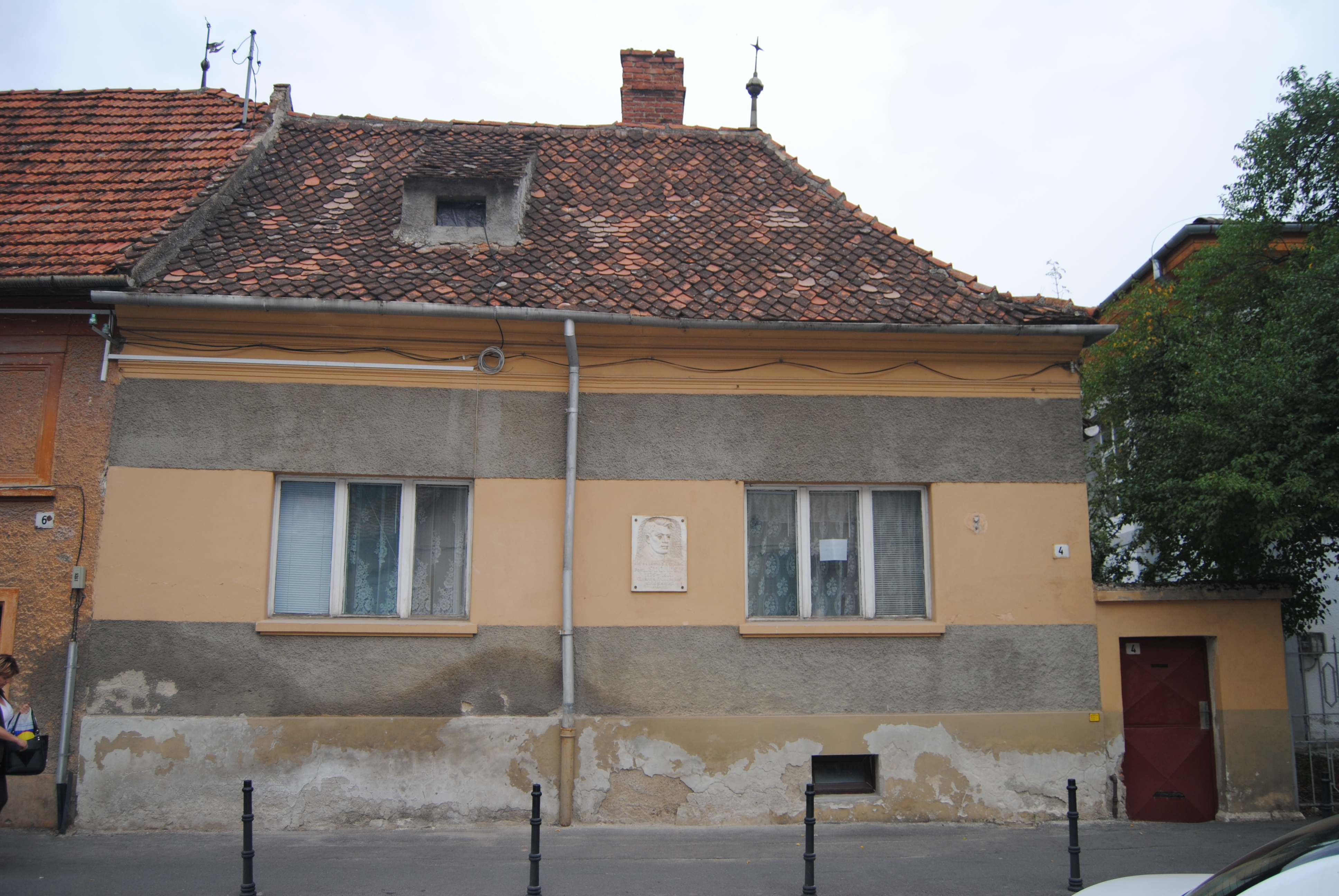 Casa Șt. O. Iosif, Str. Prundului nr. 4, Brașov